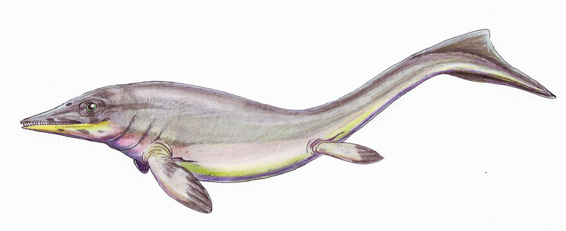 Grippia longirostris